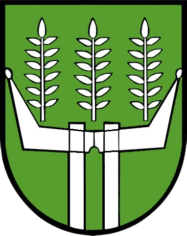 Das Wappen zeigt auf grünem Grund drei silberne Eschenblätter über zwei wachsenden Berghacken, Öhr an Öhr, seitlich an die Schildränder stoßend. Die Einbindung der Eschen begründet sich im slawischen Ortsnamen „Jasen“ (Eschenbach). Die Berghacken symbolisieren die Bergbauvergangenheit des Ortes, während der grüne Grund auf den einstigen landesfürstlichen steirischen Besitz in Gasen deutet.